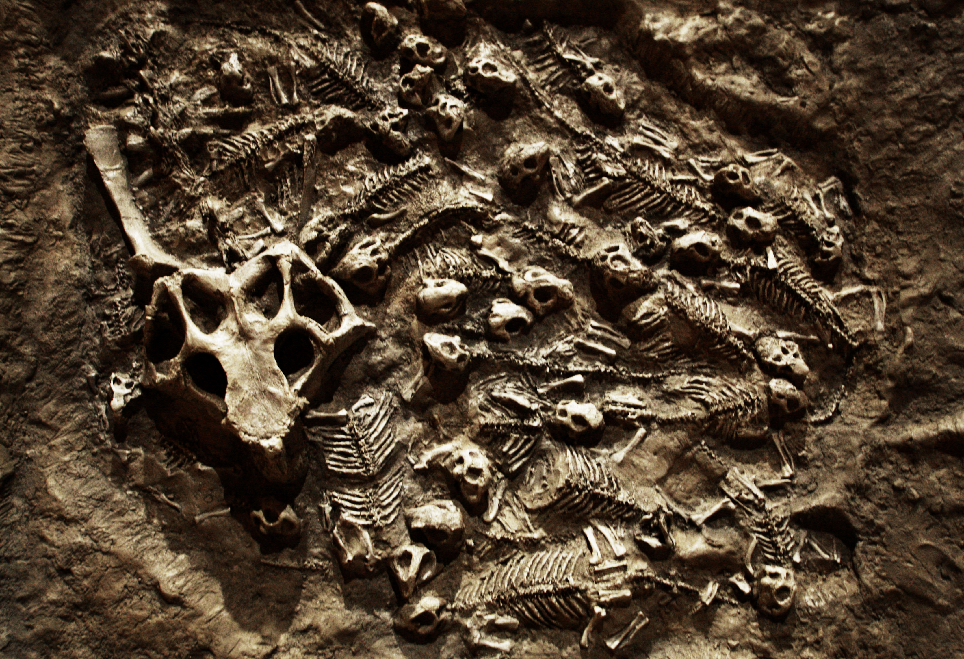 xí quách hóa thạch yummy.........